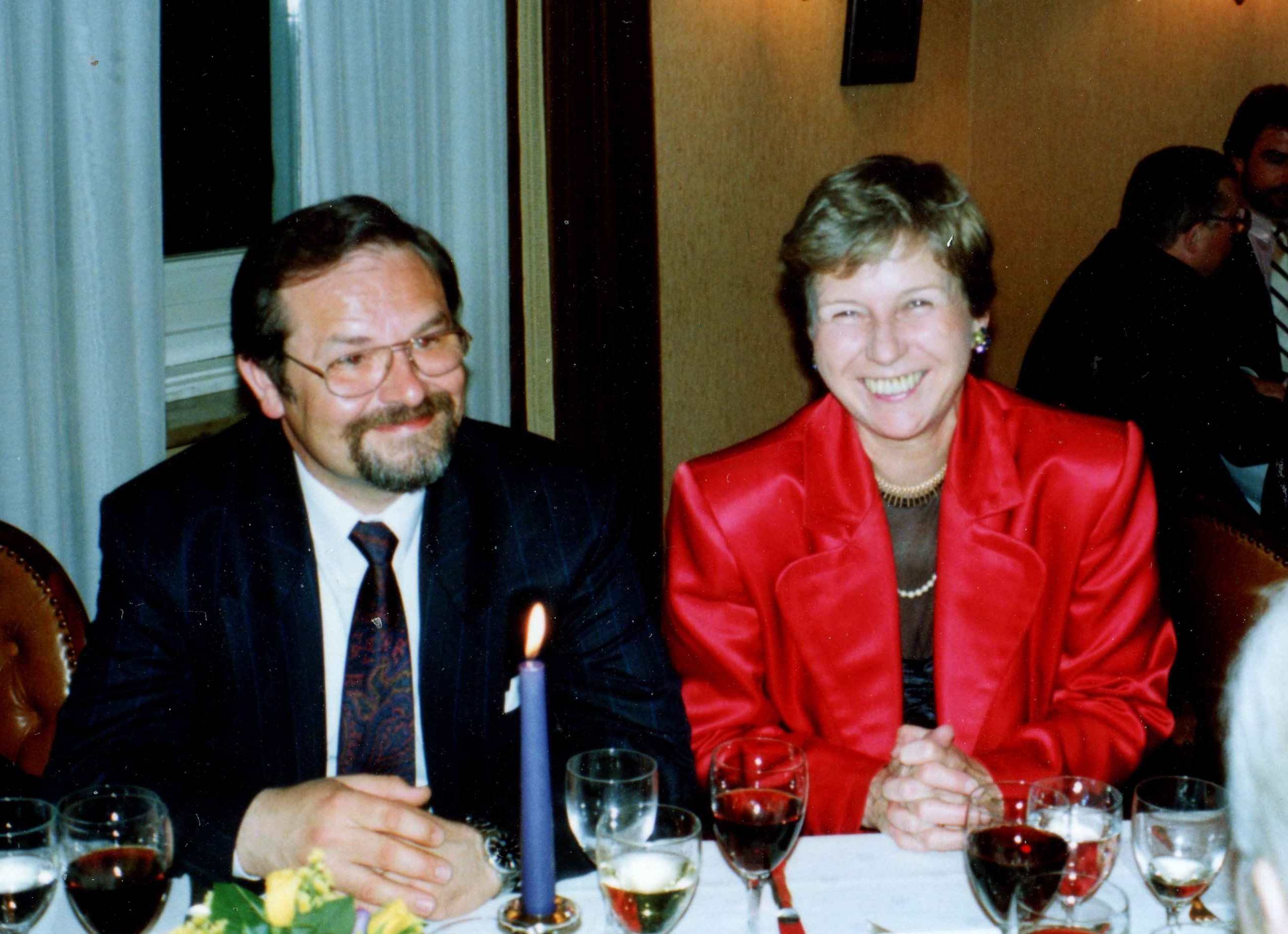 Politiker Günter Elste und Helga Mauersberger, Geschäftsführerin Studio Hamburg, bei einem DAG-Empfang in Hamburg